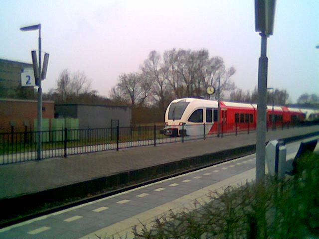 Een spurt arriveert in Winschoten.